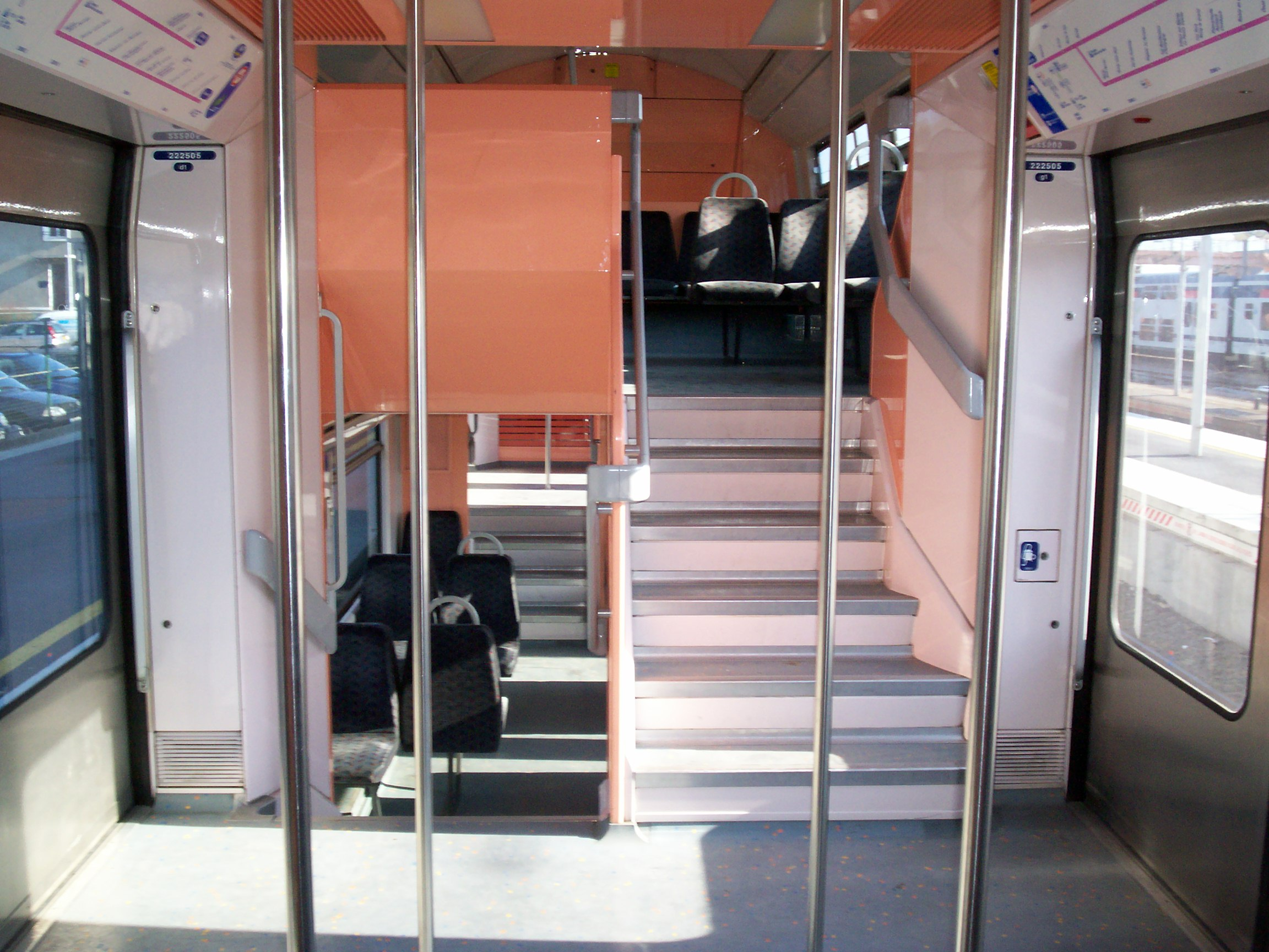 Vue des deux étages d'un Z22500